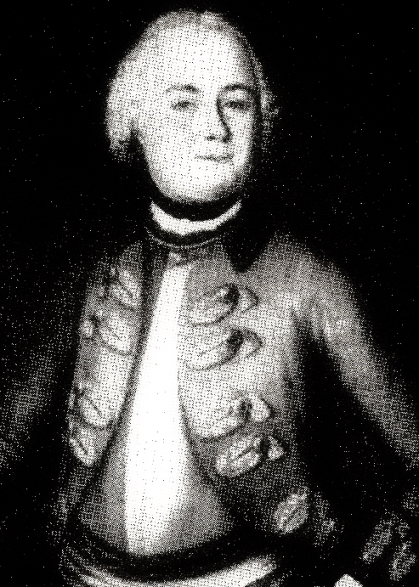 Georg Detlof von Uexkülli (1668-1710) portree